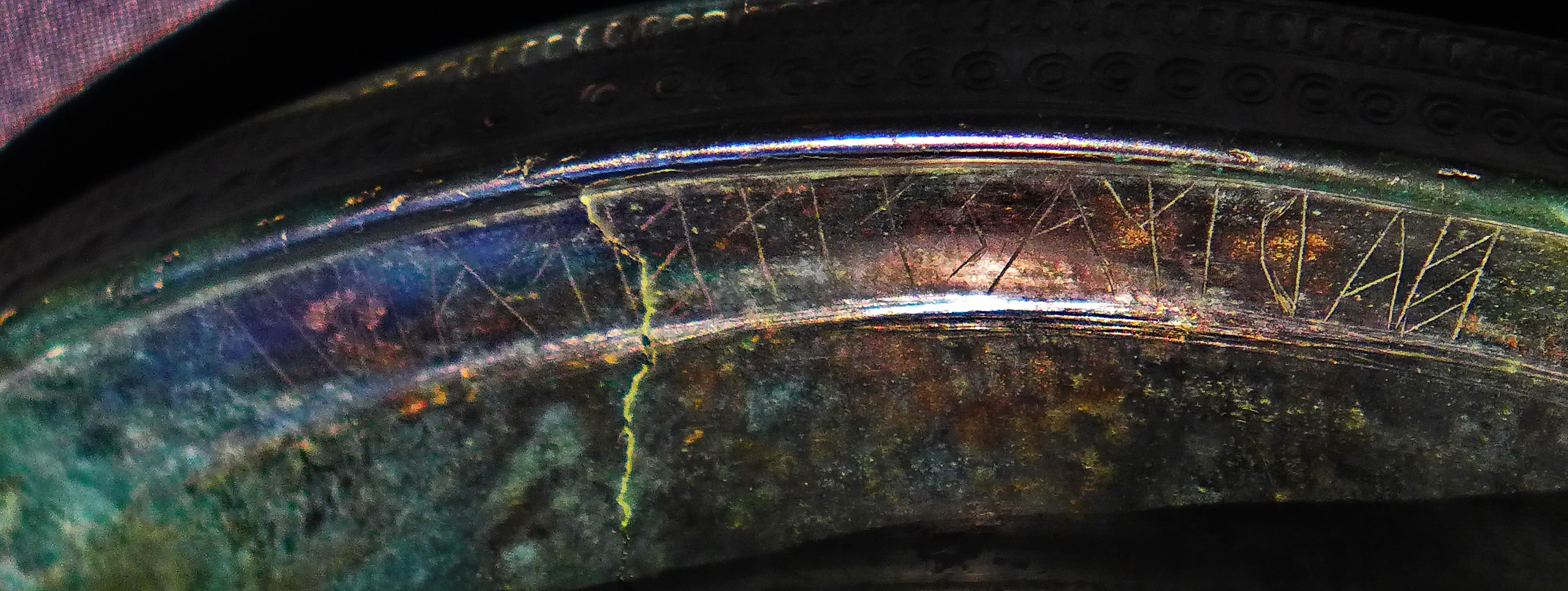 Helm von Negau B (HARIGASTI-Inschrif) ; Kunsthistorisches Museum, Wien